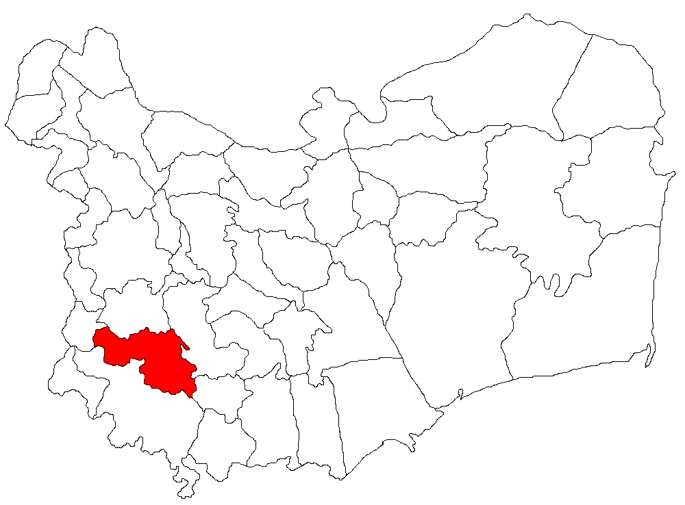 Categorie:Hărţi ale judeţului Tulcea